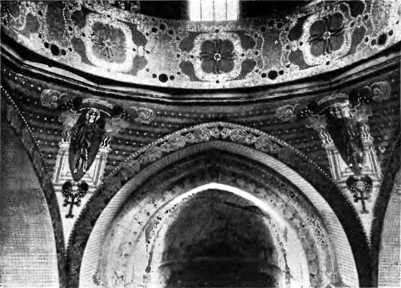 ilustracja strony 55 - Łuk triumfalny. Pachy i część bębna pod kopułą. Mozajki prof. J. Mehoffera. Ornamenty w głębi na archiwolcie: wiek XIV/XV.